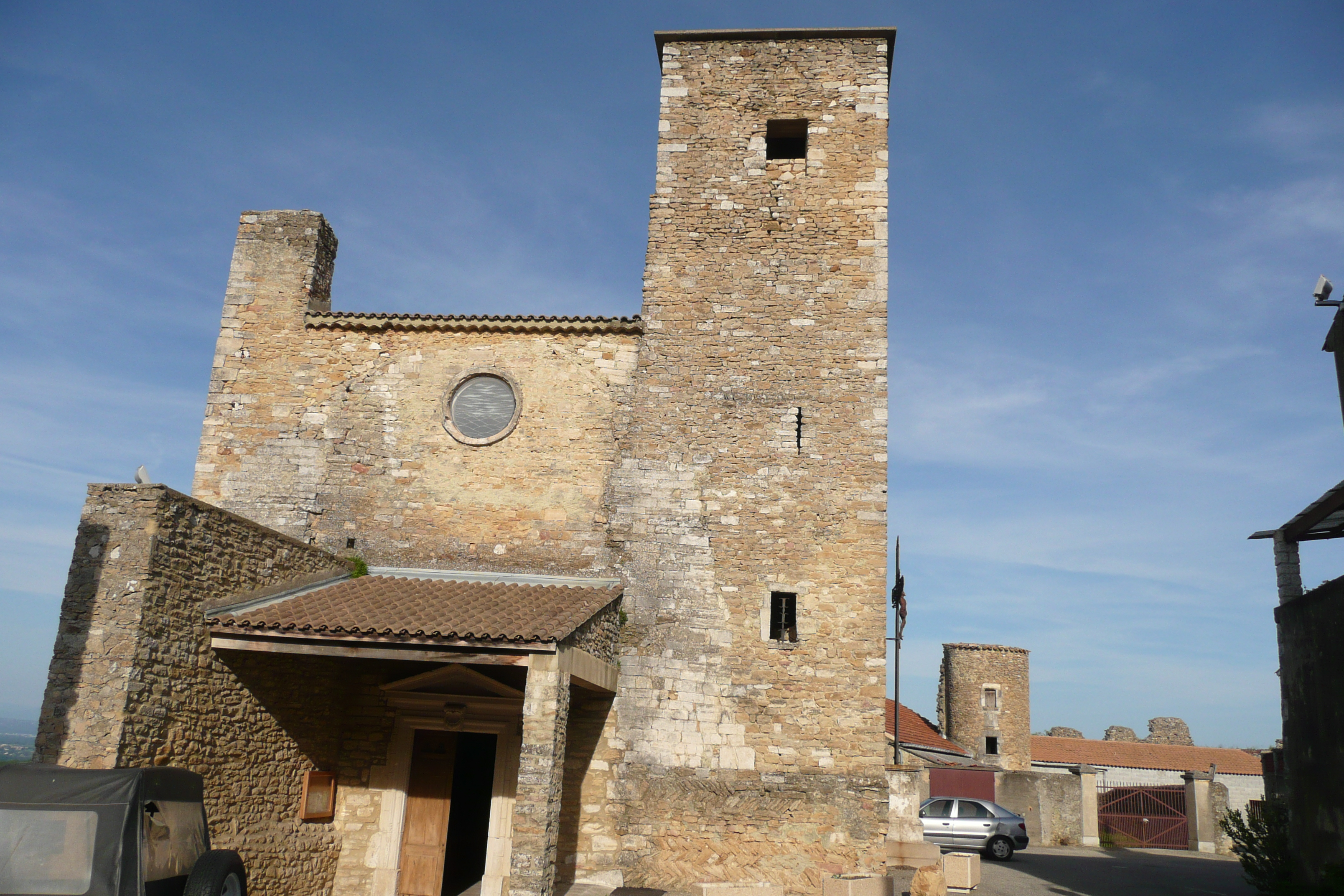 Eglise à Salazac.